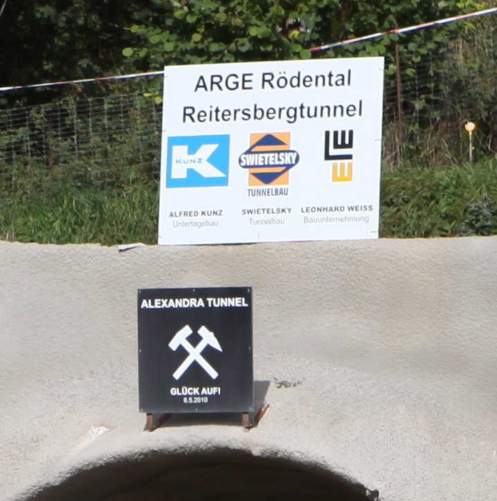 Notausgang des Tunnels Reitersberg, Oberwohlsbach im Landkreis Coburg